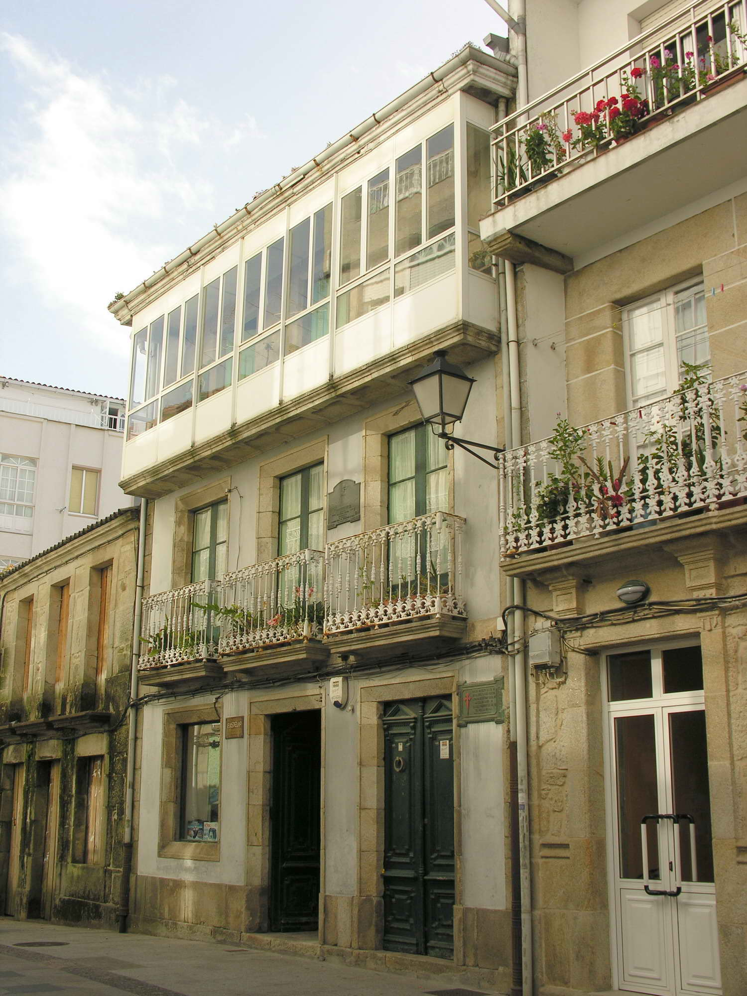 Casa de Castelao Rianxo. Galicia. España